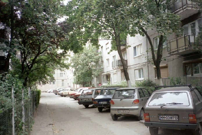 mem fotis, neniu kopirajto, foto farita dum julio 2003. Matene oni aŭdadis ringokolombojn, kaj vespere grilojn.